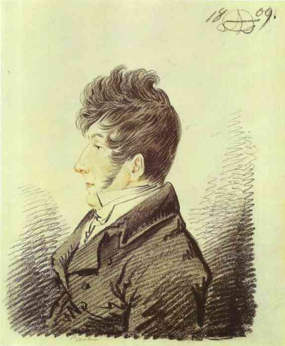 Пётр Шаликов. 26,4 x 18,8 см Галерея: Irkutsk Art Museum, Irkutsk, Russia